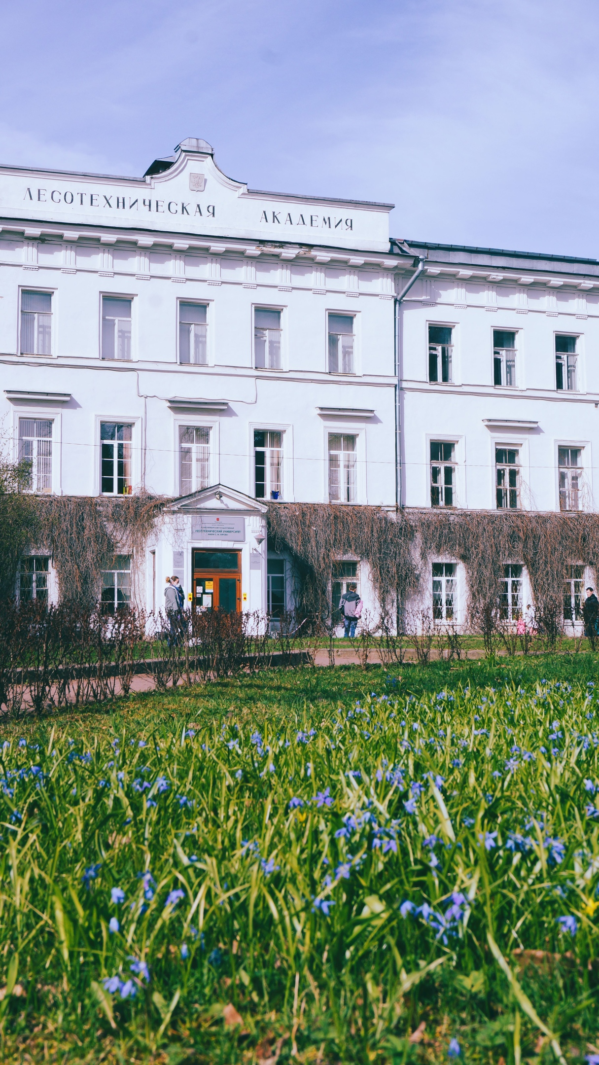 Весна в СПбГЛТУ